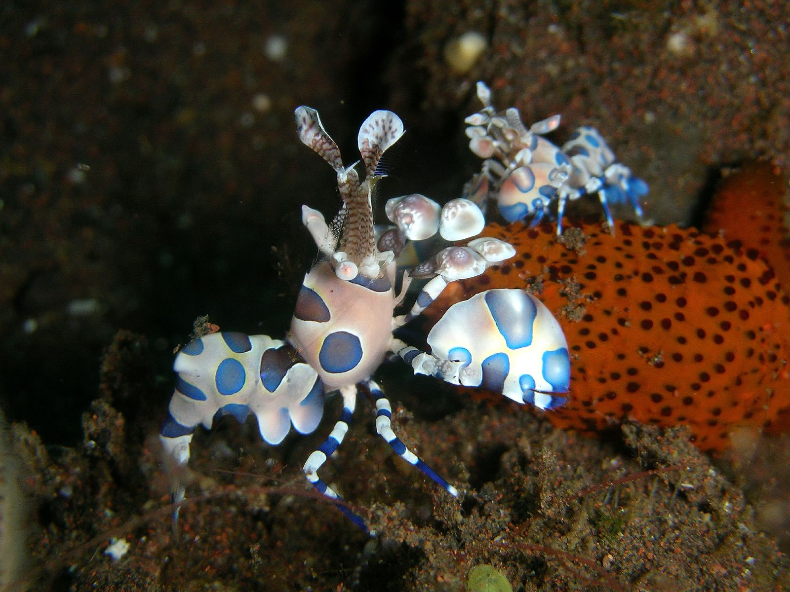 Harlequin Shrimp (Hymenocera picta)